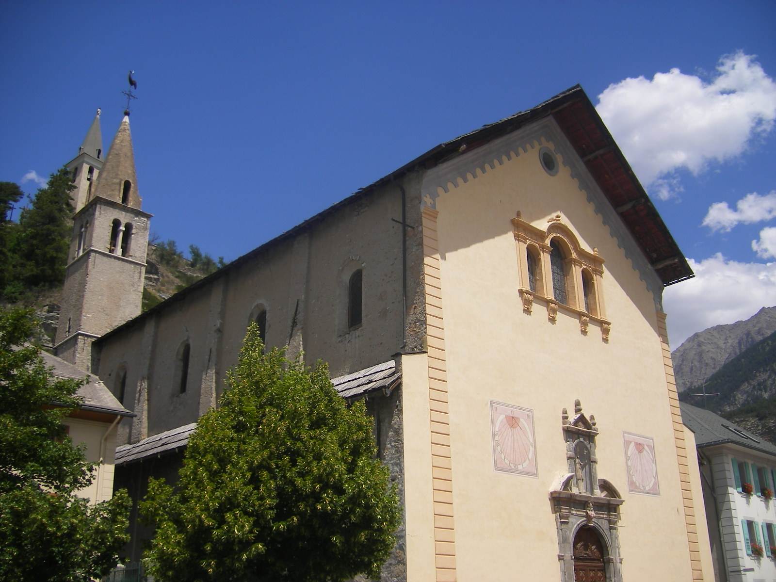 Jausiers